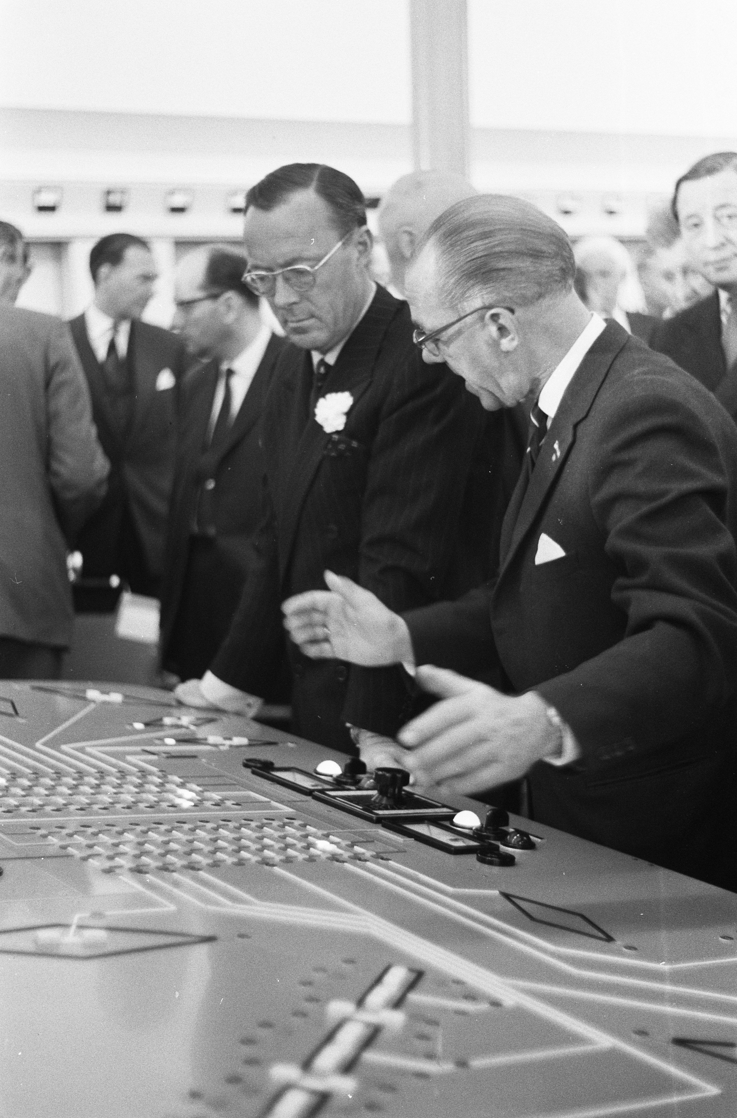 Collectie / Archief : Fotocollectie Anefo Reportage / Serie : [ onbekend ] Beschrijving : Prins Bernhard stelt het zenderpark van de wereldomroep te IJsselstein in gebruik Datum : 2 mei 1960 Locatie : IJsselstein Persoonsnaam : Bernhard, prins Fotograaf : Pot, Harry / Anefo Auteursrechthebbende : Nationaal Archief Materiaalsoort : Negatief (zwart/wit) Nummer archiefinventaris : bekijk toegang 2.24.01.05 Bestanddeelnummer : 911-2070